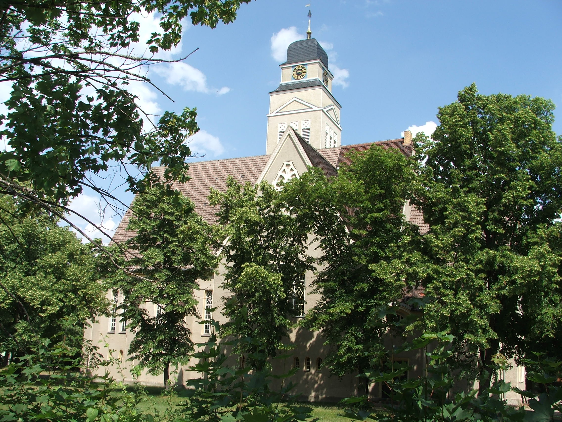 evangelische Kirche,1913 im Jugendstil erbaut, in Falkenberg/Elster